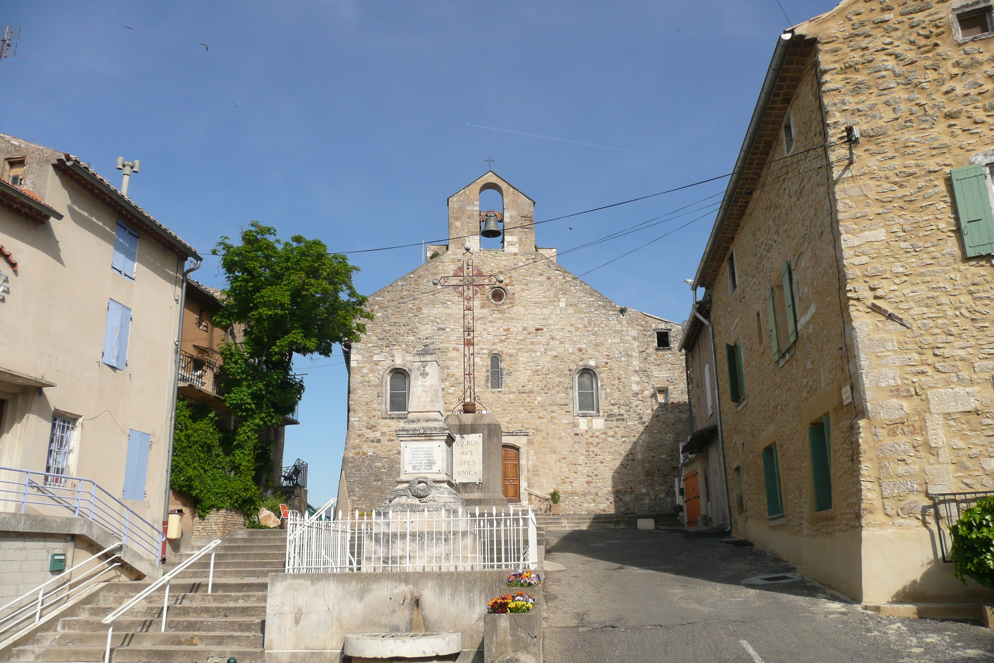 Eglise à Saint-Julien-de-Peyrolas.